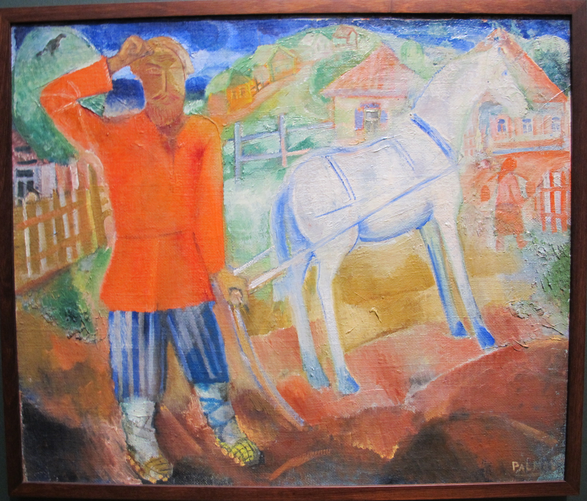 Viktor palmov, il proprietario